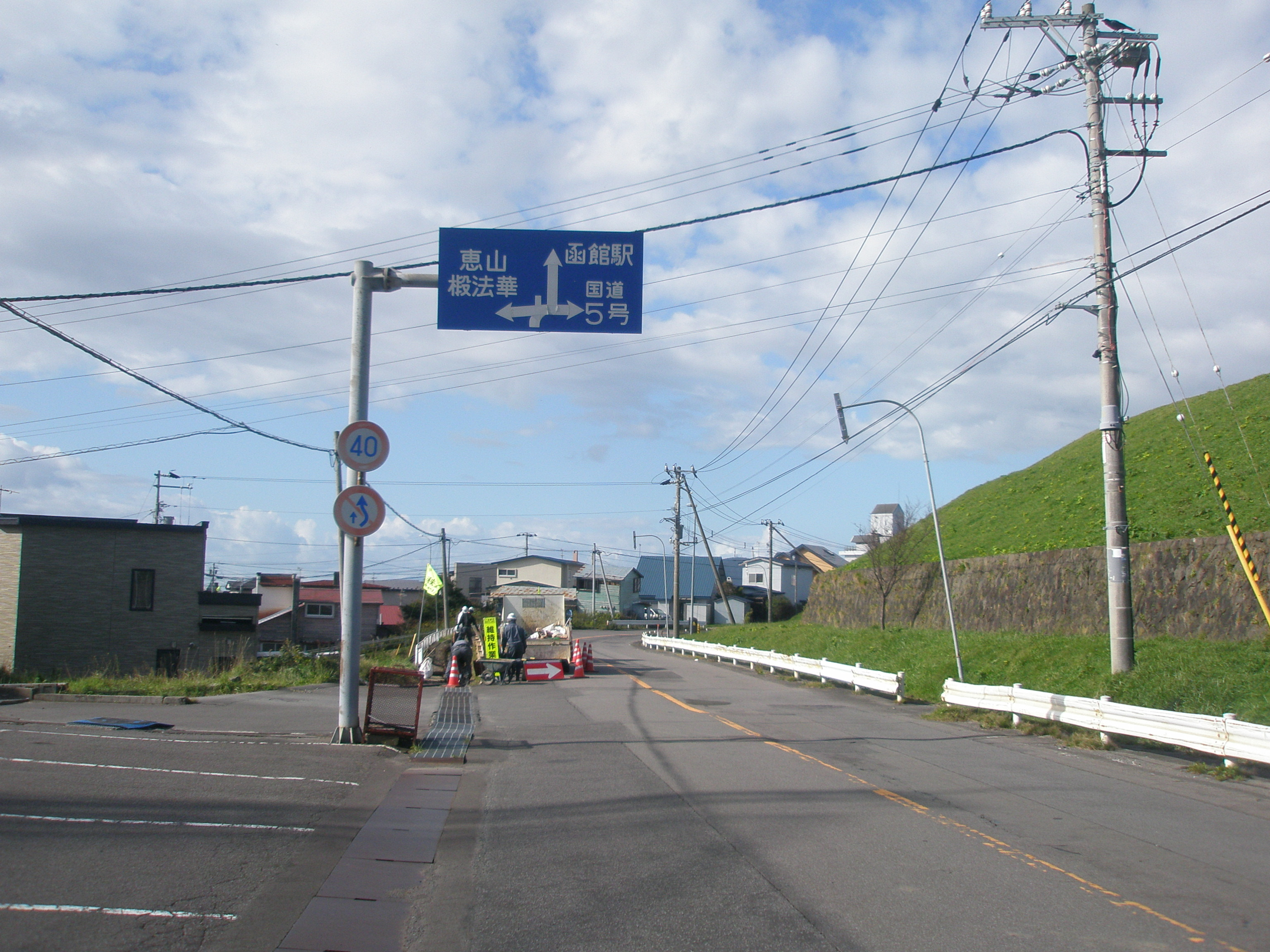 北海道道函館空港線・旧道-8 道道だった頃の名残の「方面及び方向」標識、国道278号・北海道道100号函館上磯線交点付近に終点があった